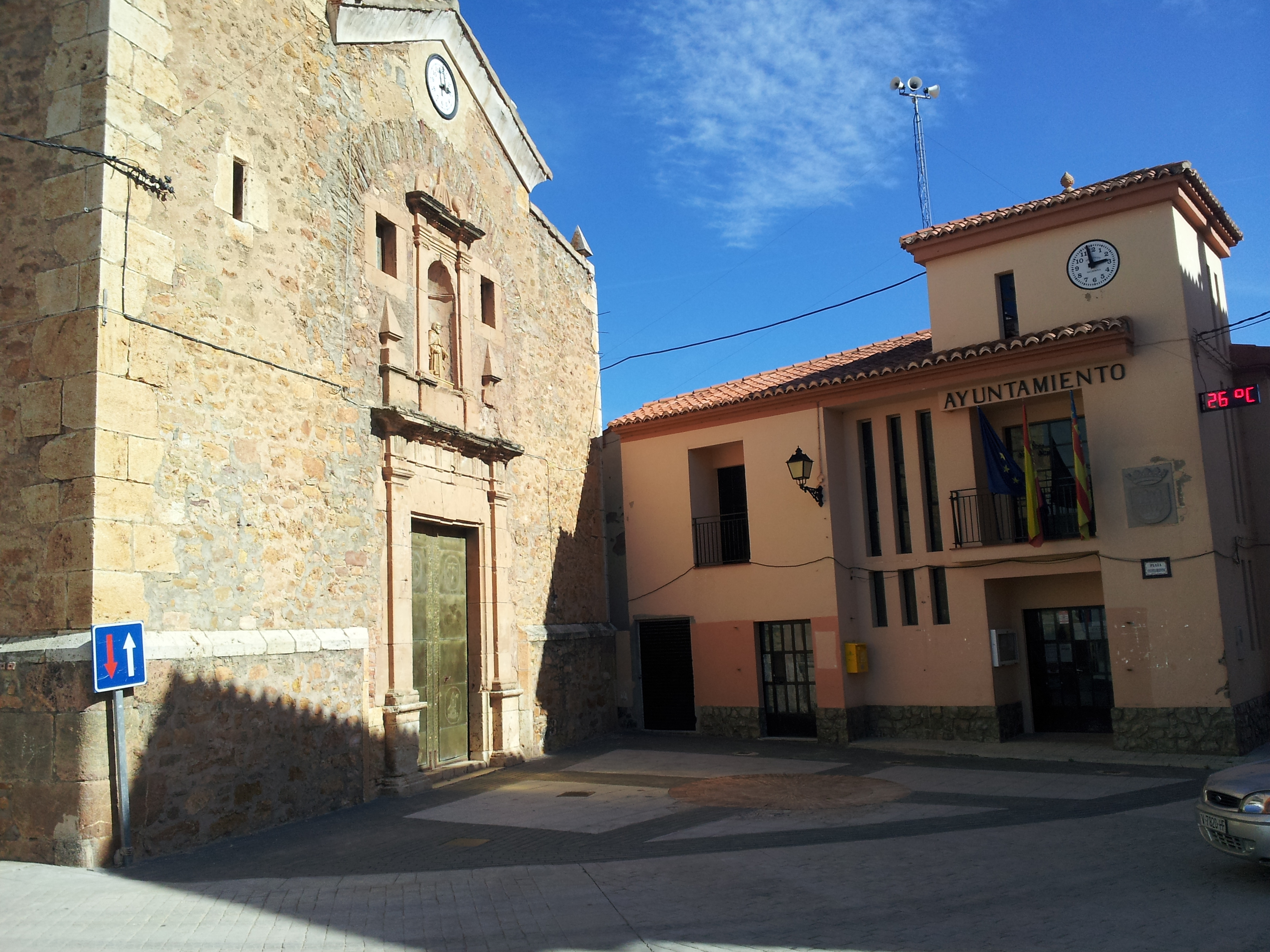 Plaça de l'Ajuntament i l'Església.